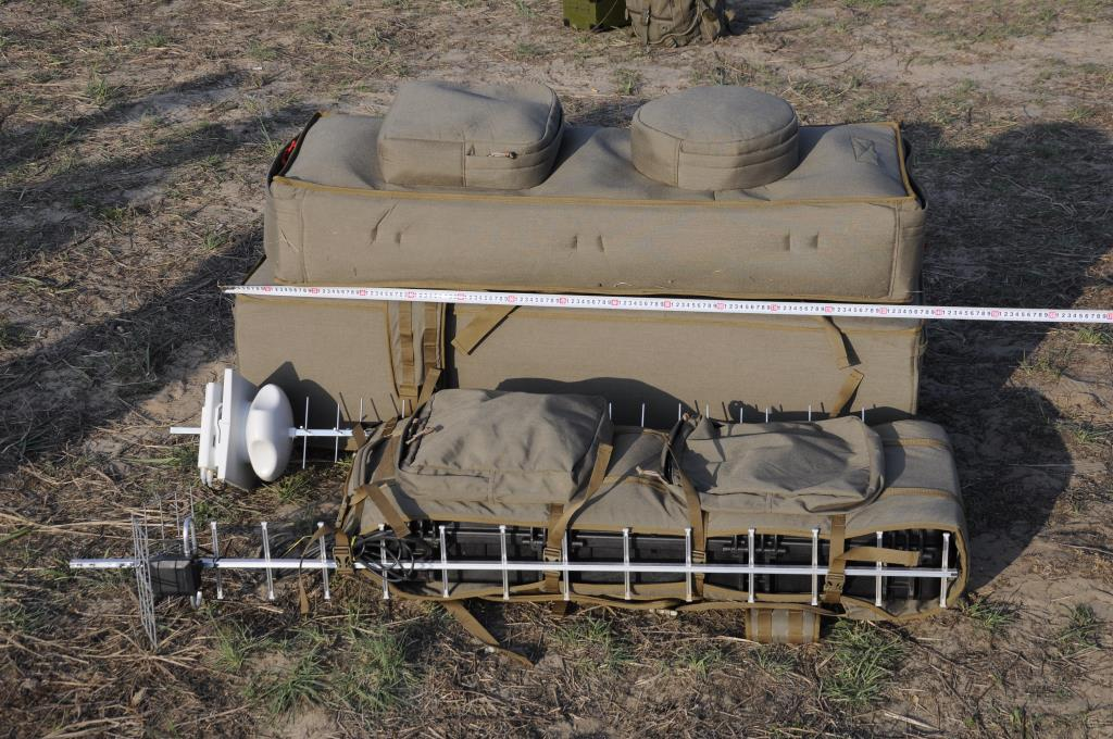 Комбо